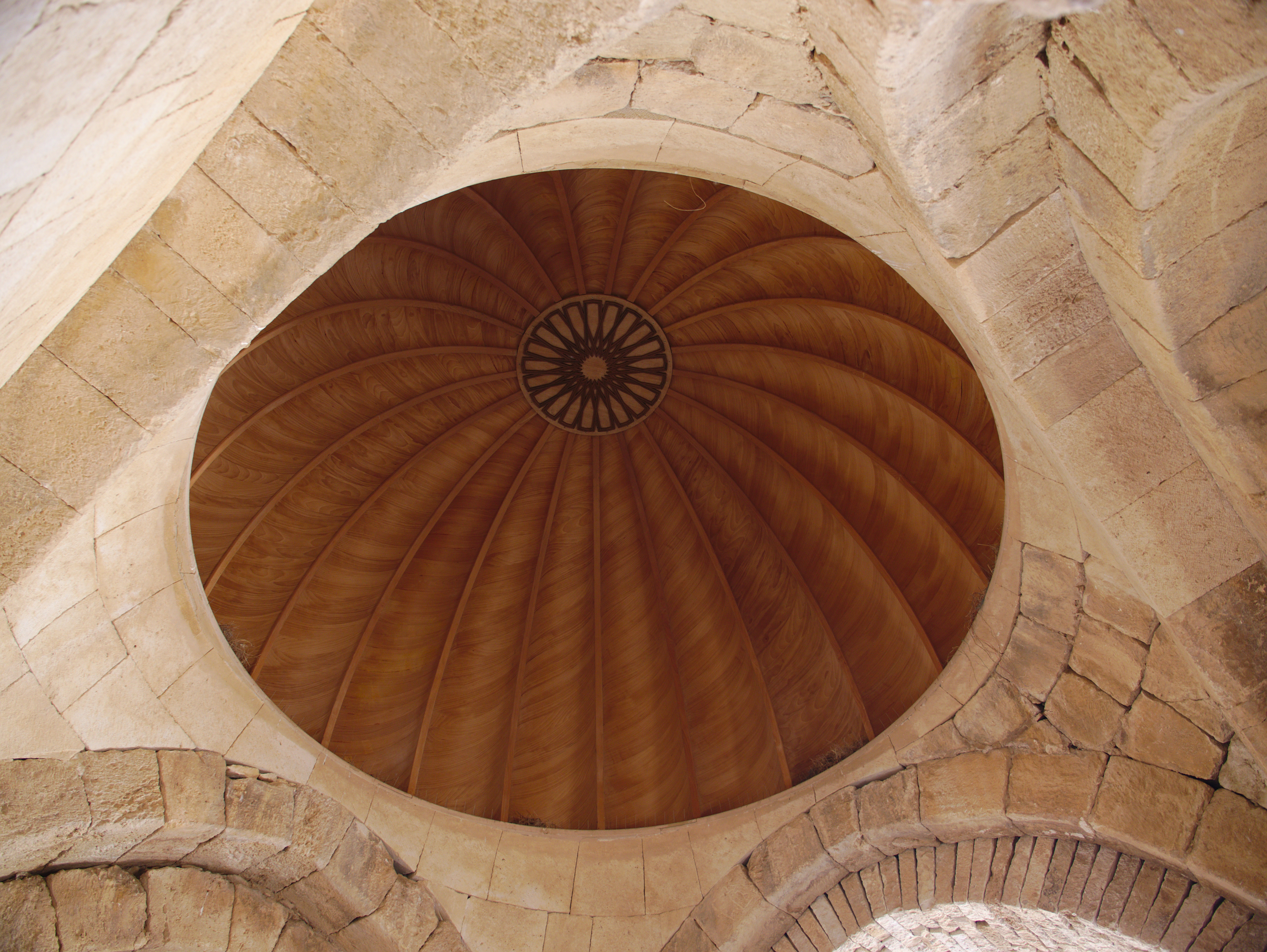 Vue de l’intérieur des thermes de Qasr al Hallabat situés à Hamman as Sarah